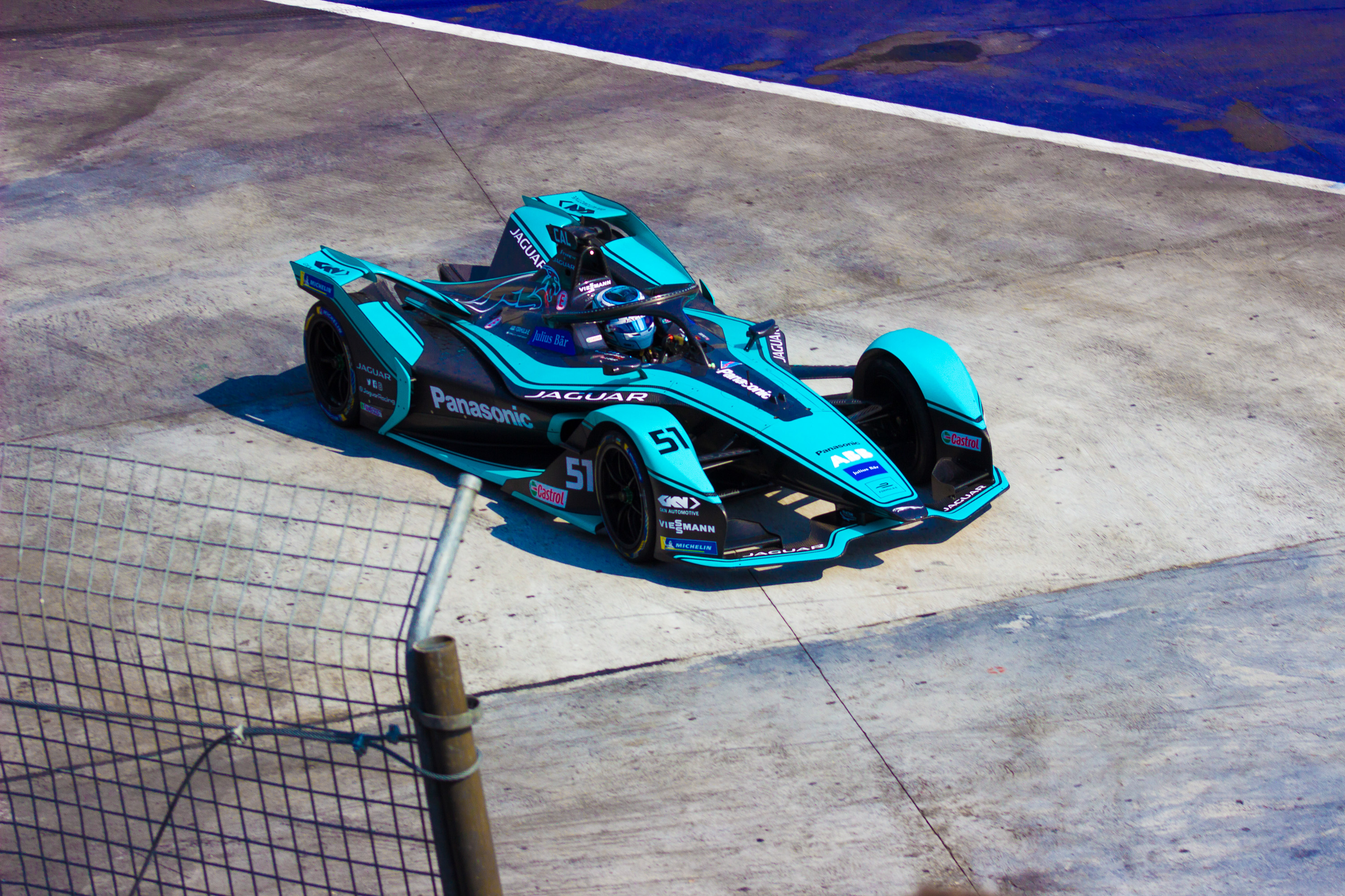 2019-20 FIA Formula E, CBMM Niobium Mexico City E-Prix 2020, Autódromo Hermanos Rodríguez, Ciudad de México, 15 de febrero 2020